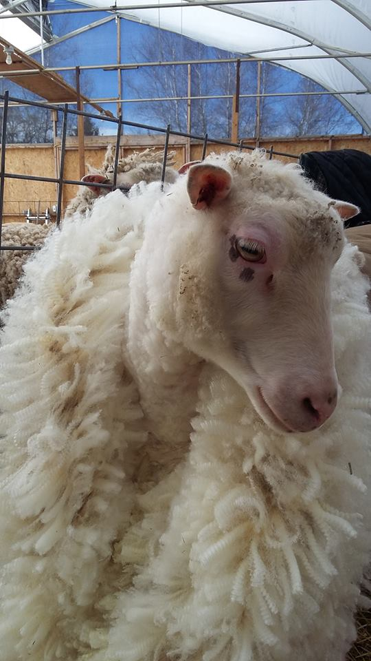 suomenlammas